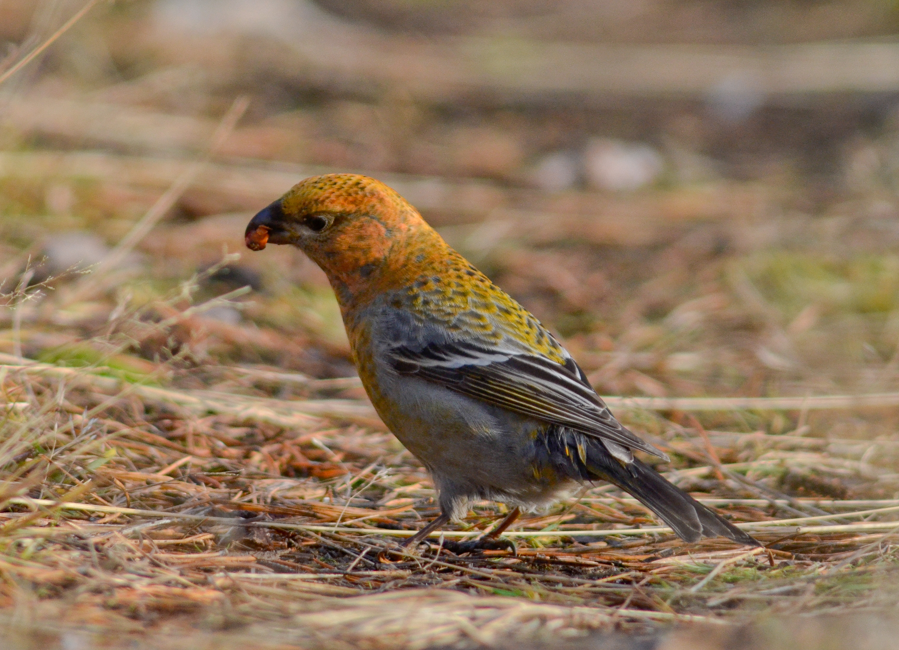 Pinicola enucleator, female or immature male, Kotka, Finland